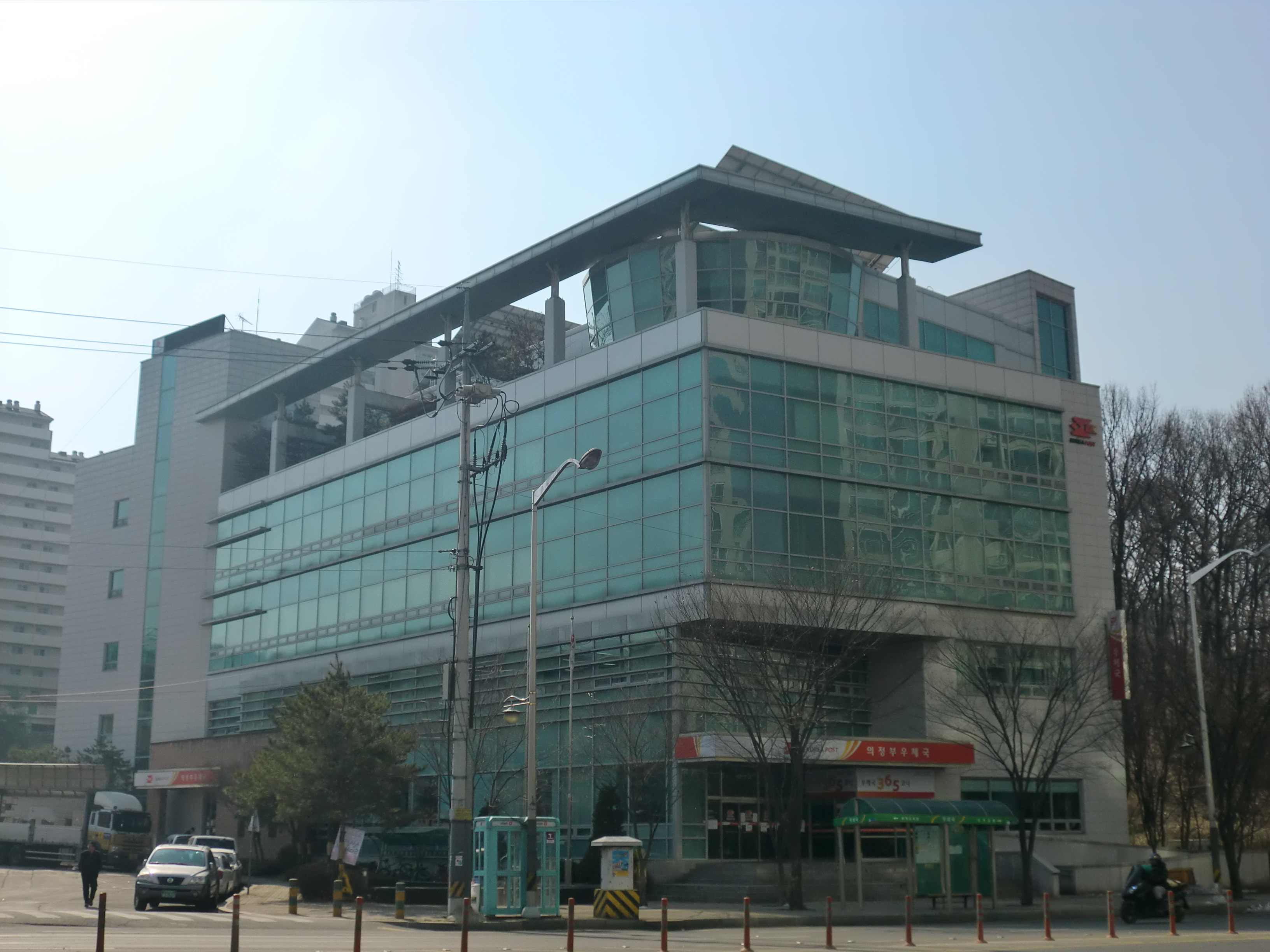 경기도 의정부시에 있는 의정부우체국